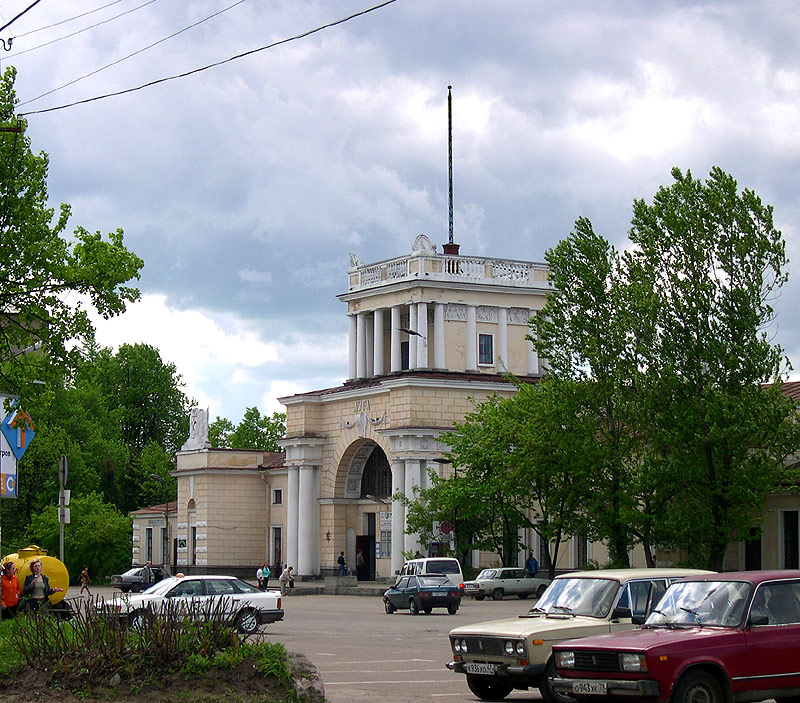 Вокзал в городе Луга (Ленинградская область)